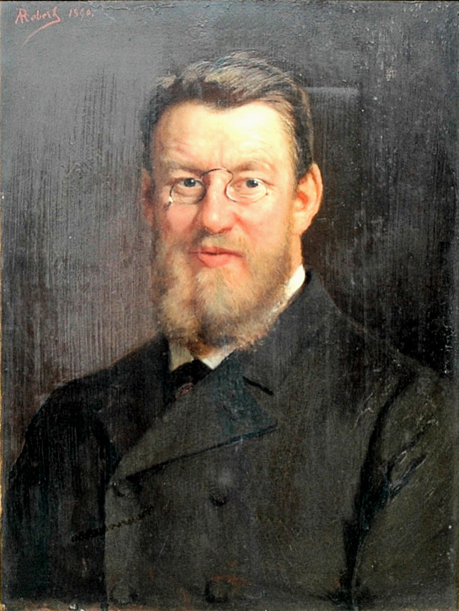 Portrait de Gustave Walckiers